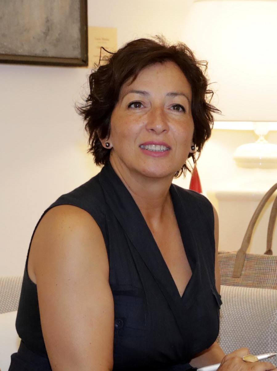 Cati Rodríguez Morcillo, alcaldesa de San Fernando de Henares